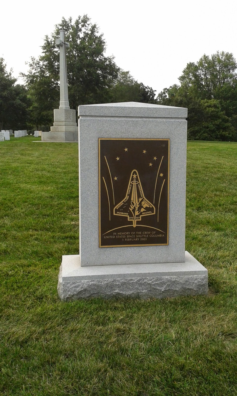 A Columbia űrsikló emlékműve az Arlingtoni Nemzeti Temetőben, Washington